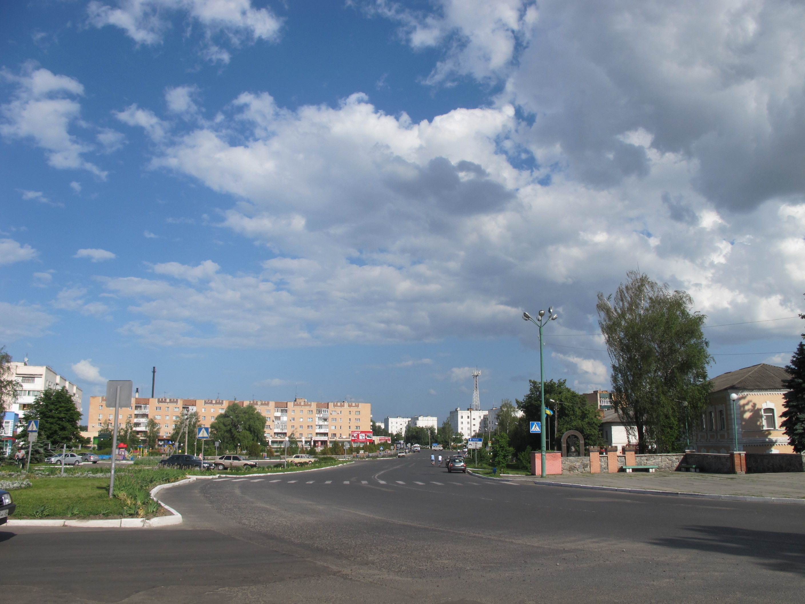 Улица в городе Лохвица.